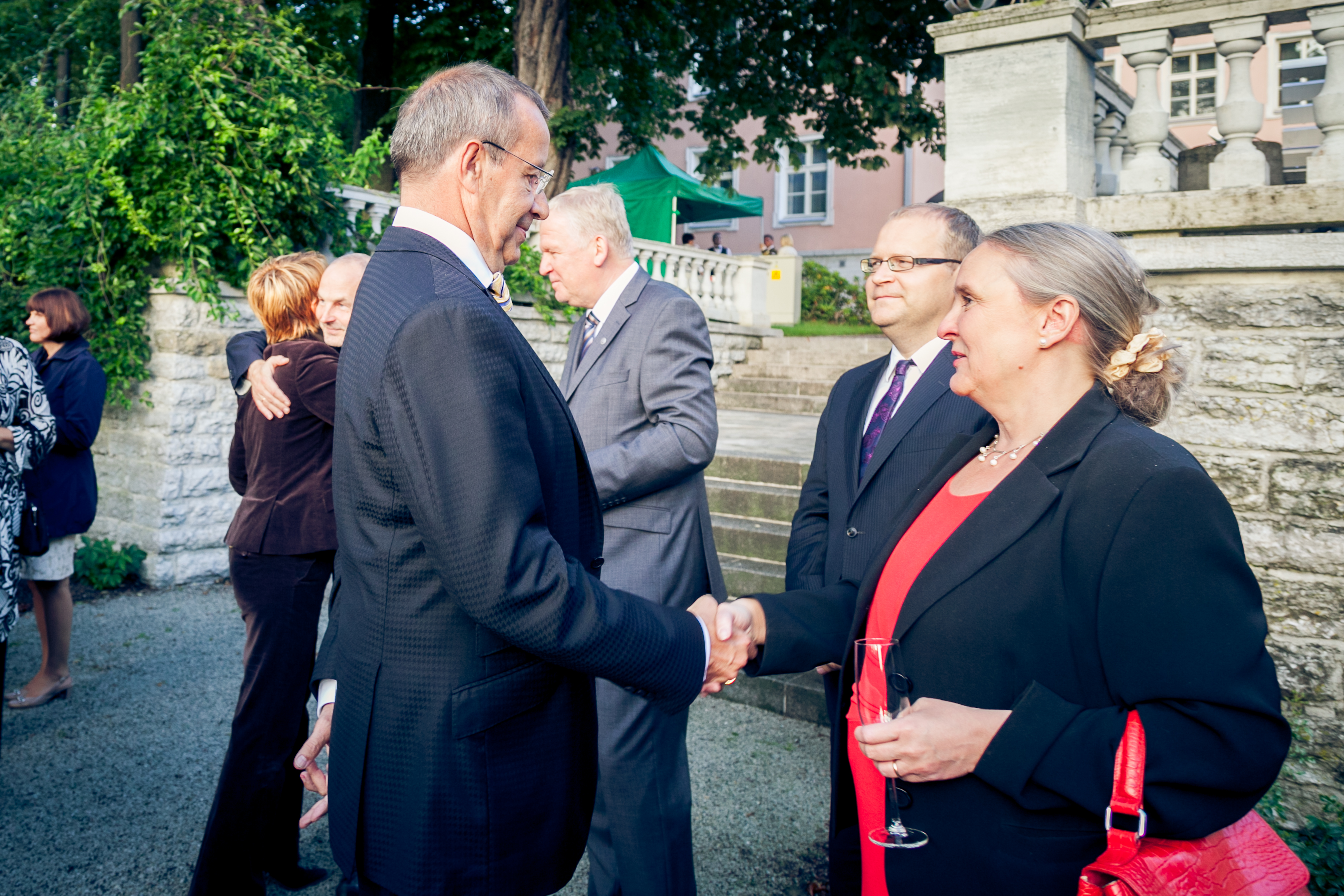 Aino Lepik von Wirén (Eesti suursaadik Suurbritannia ja Põhja-Iiri Ühendkuningriigis) Eesti suursaadikute vastuvõtul Kadriorus.